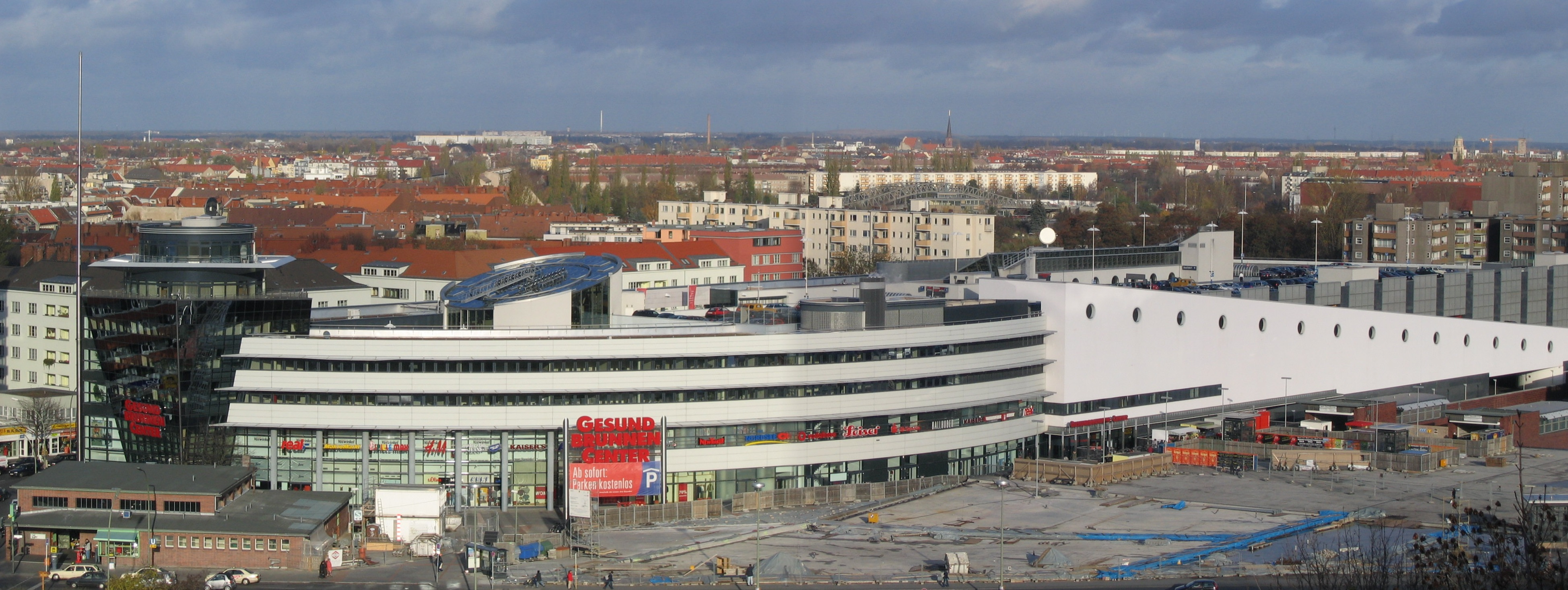 Berlin Gesundbrunnencenter, Panoramabild, vom Humboldthain fotografiert, 2004 Andere Versionen: keine